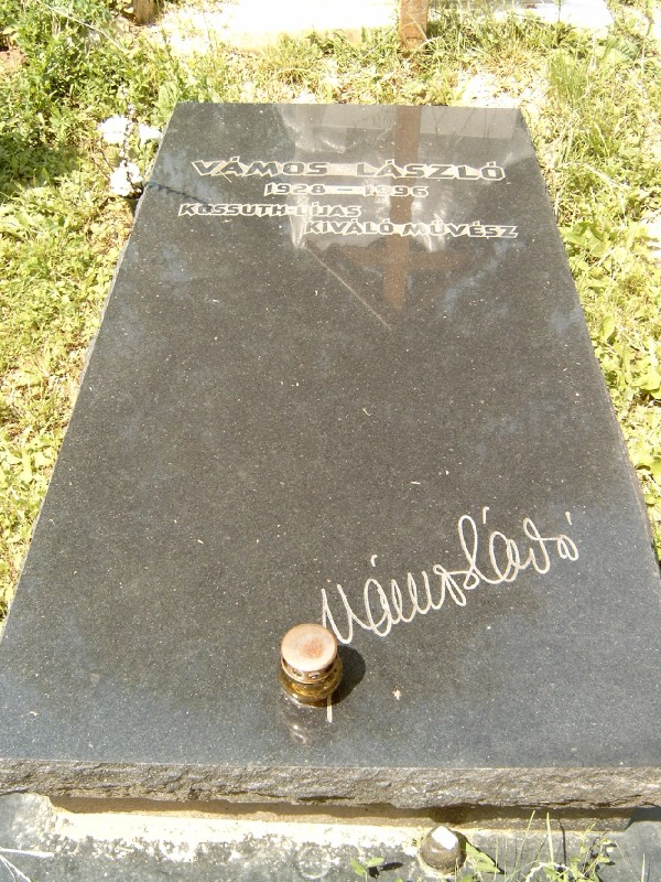 Vámos László (Budapest, 1928. január 30.– 1996. február 3.) rendező sírja Budapesten. Farkasréti temető: 25-4-7.